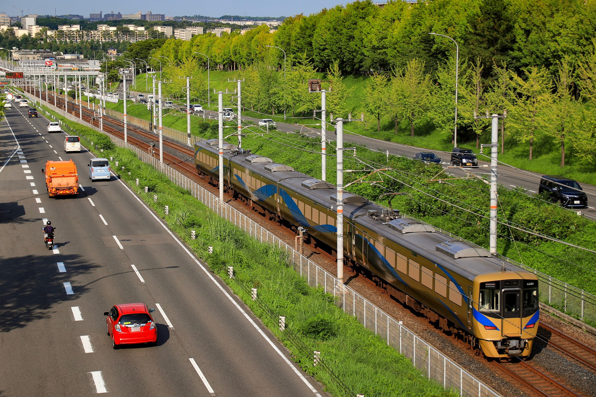 泉北1号線と並走する特急「泉北ライナー」